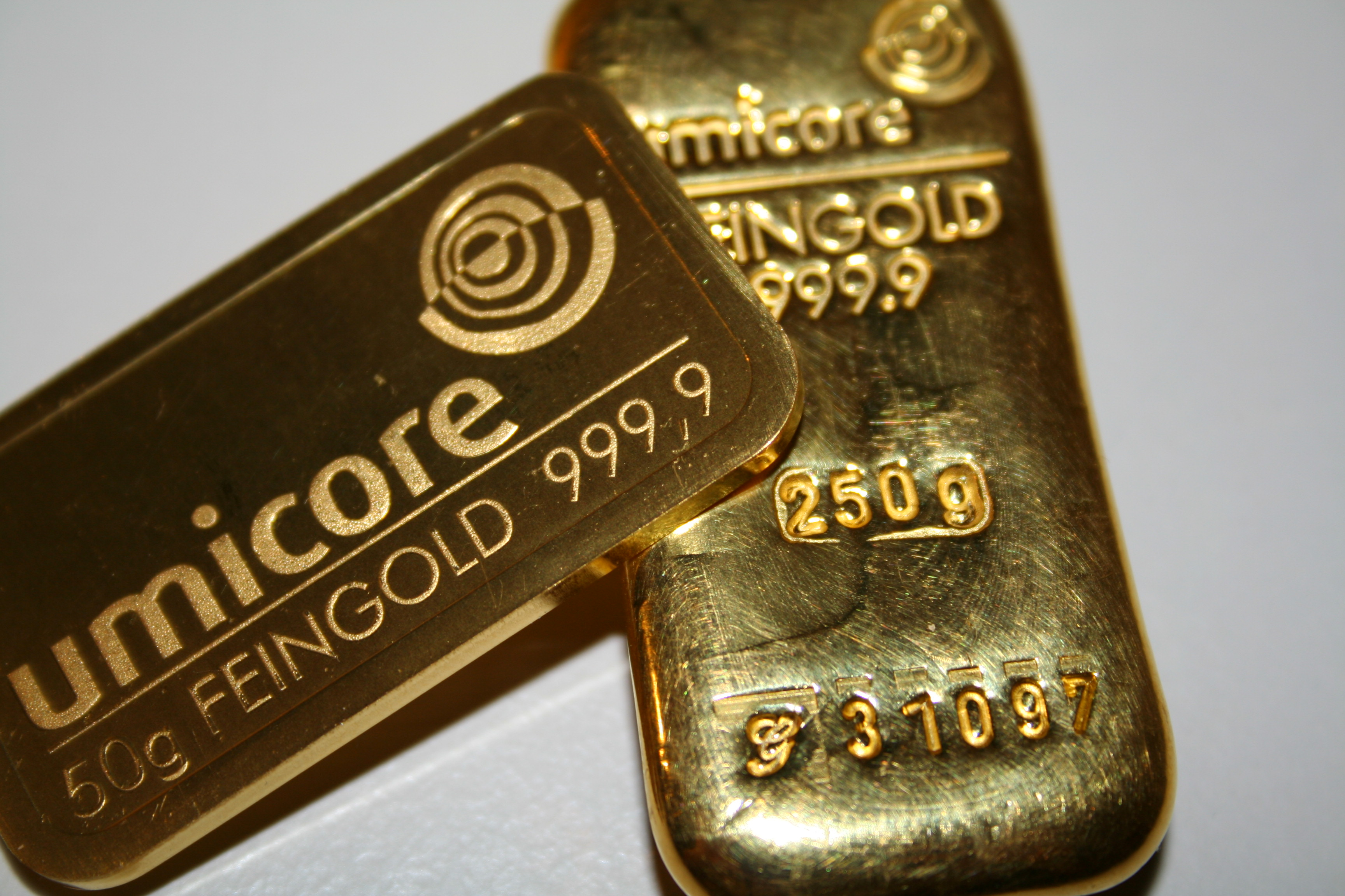 Zwei Goldbarren 250g und 50g 999,9 er Feingold.